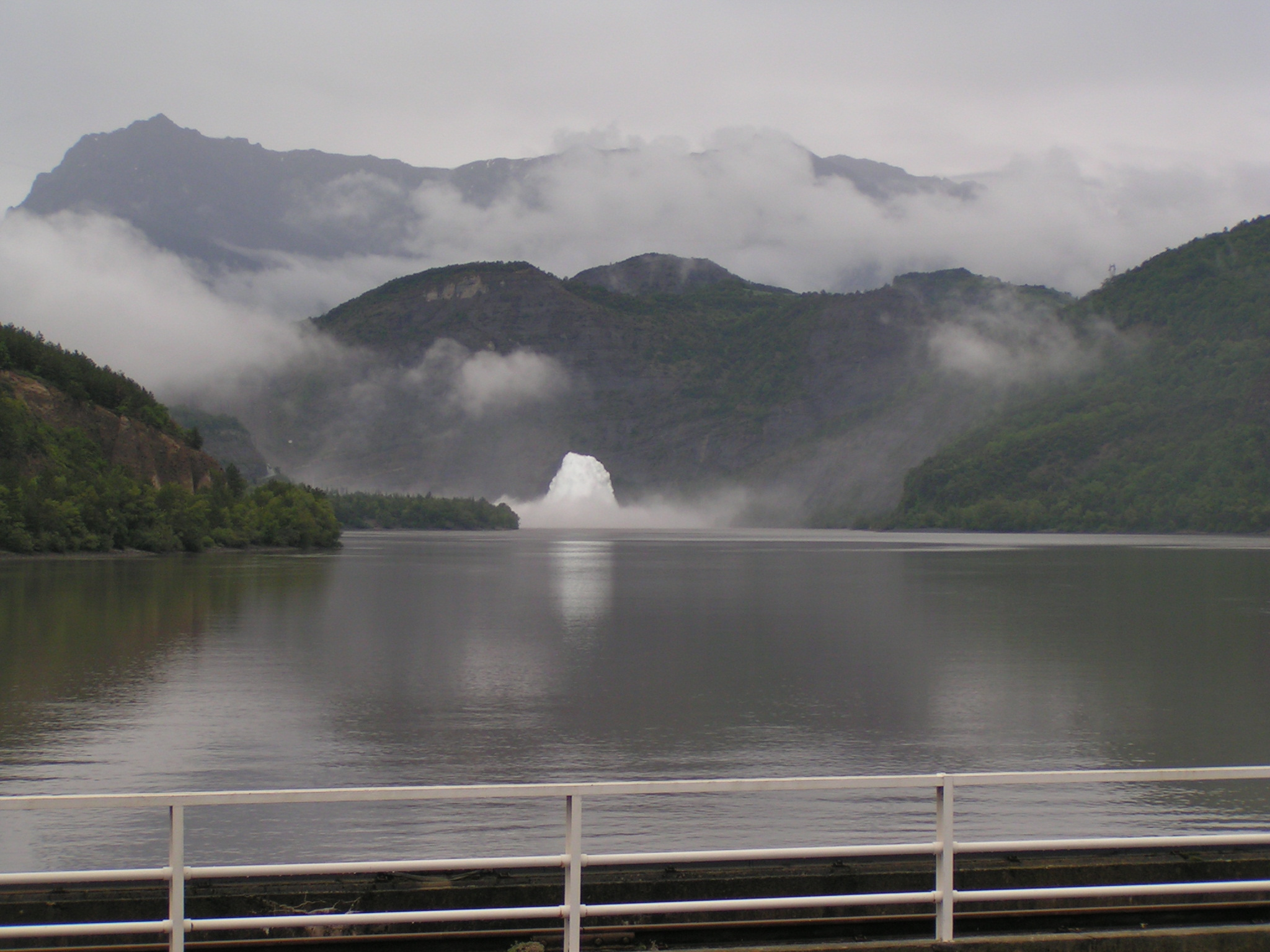 Evacuateur de crue depuis le pont d'Espinasse